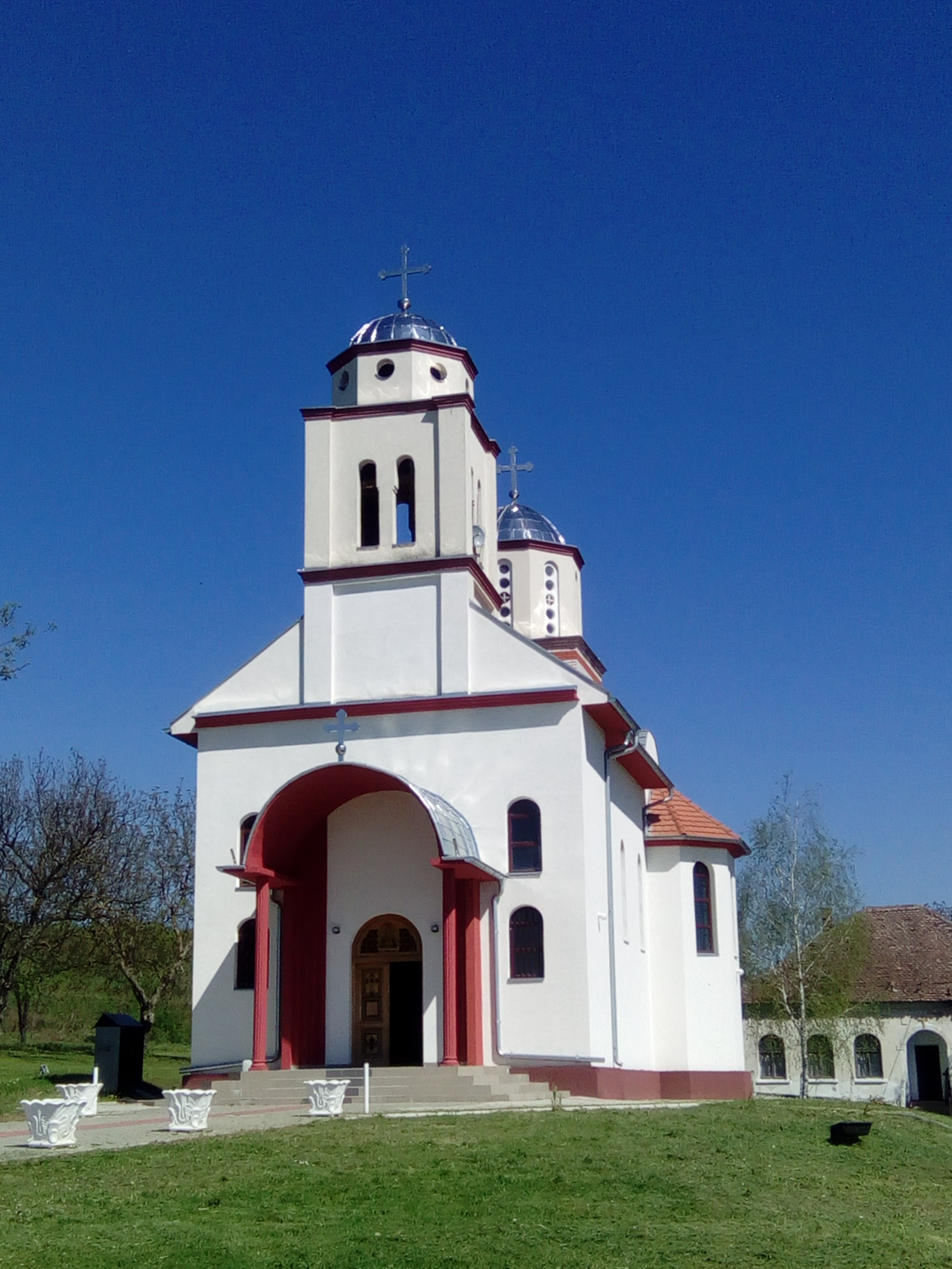 Srpski (latinica): Crkva u Krežbincu